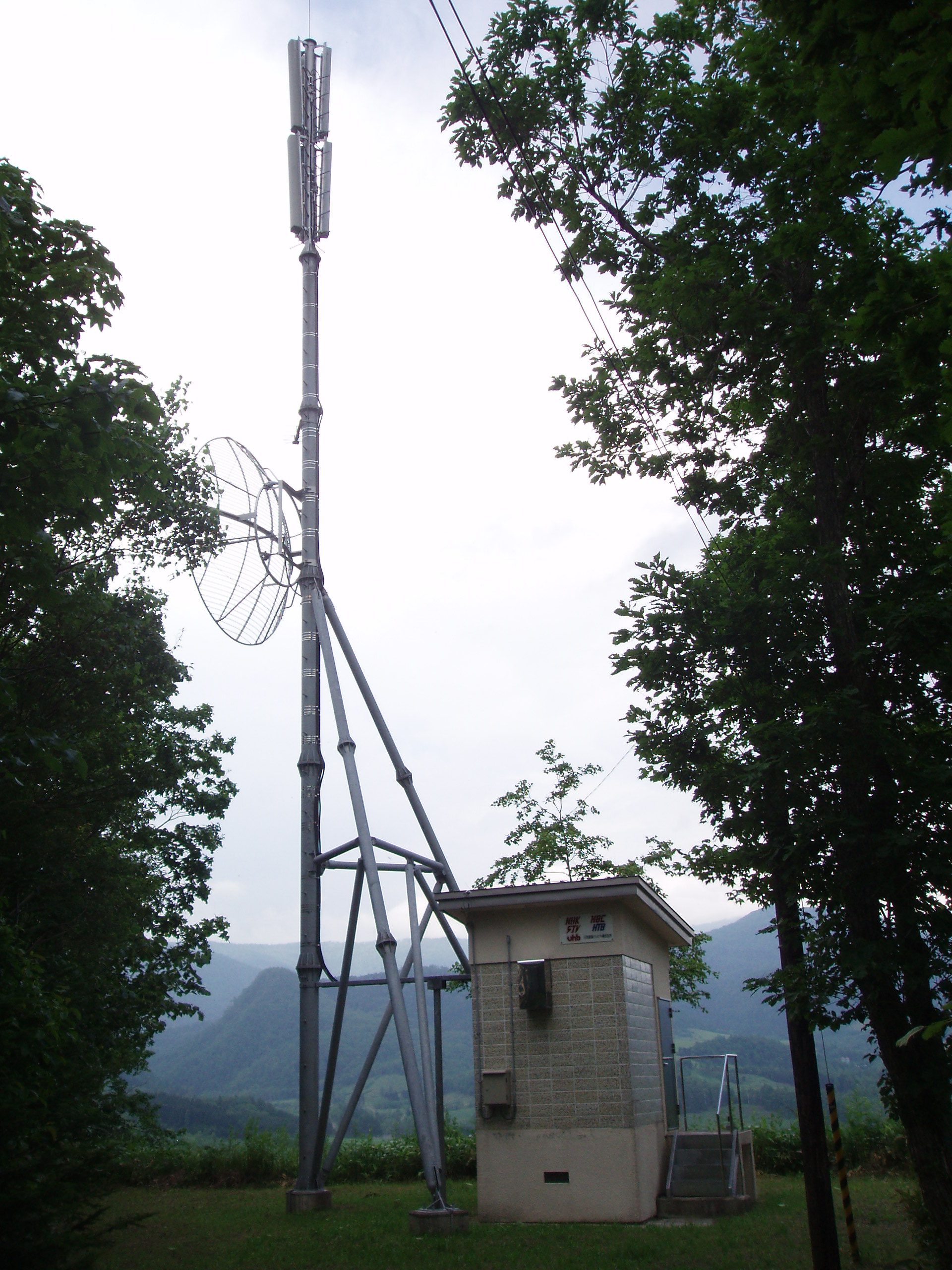 日高銀嶺中継局 NHK・HBC・STV・HTB・UHB送信設備